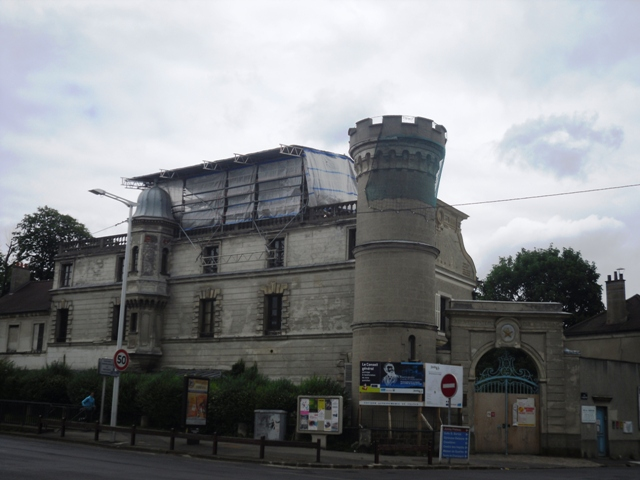 L'observatoire Camille Flammarion de Juvisy-sur-Orge (91)